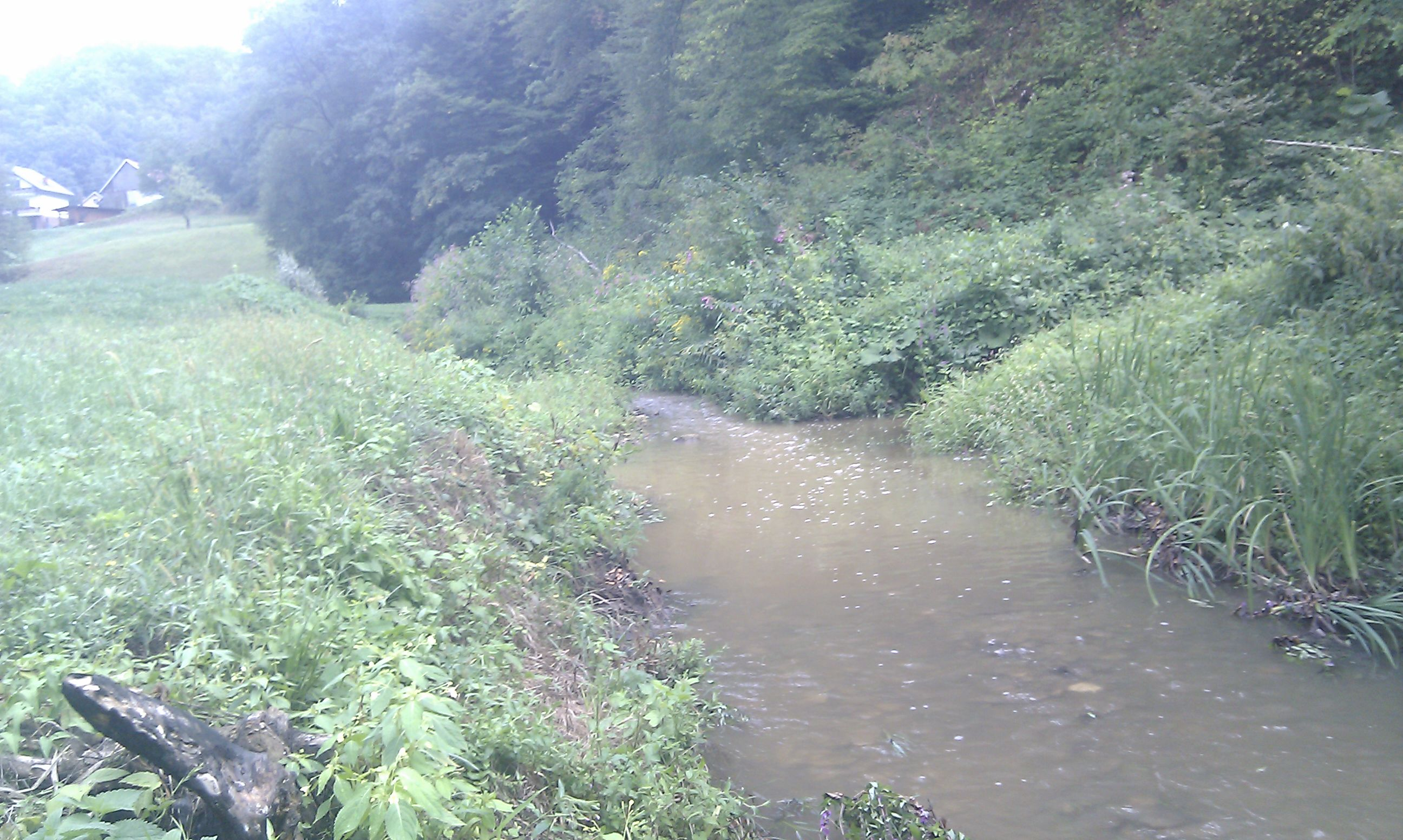 Potok Rogatnica pri Dobrini (bližina Žetal) (po dežu)